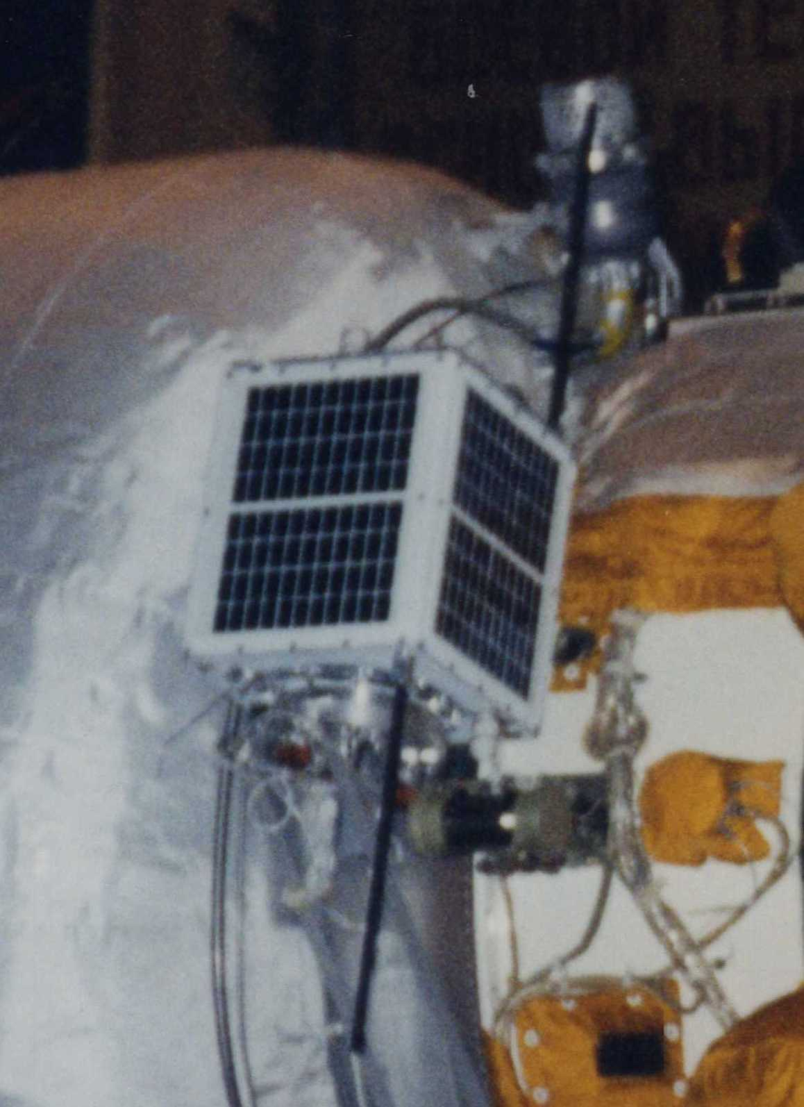 Fotografía del micro-satélite Argentino uSat-1 Víctor durante la integración en el vector de lanzamiento Molniya en el Cosmódromo Plesetsk en Rusia